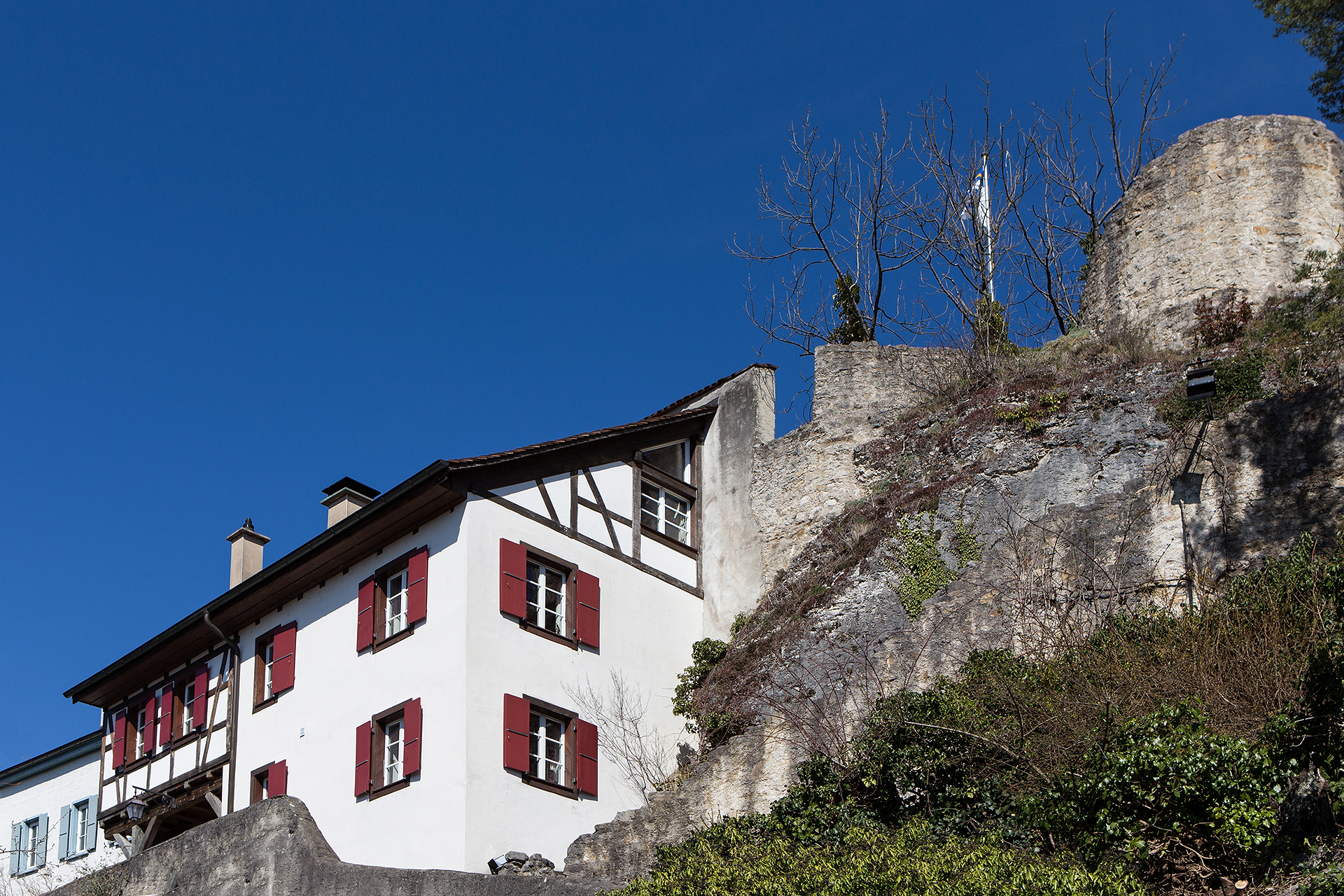 Schloss und Schlossruine in Münchenstein (BL)